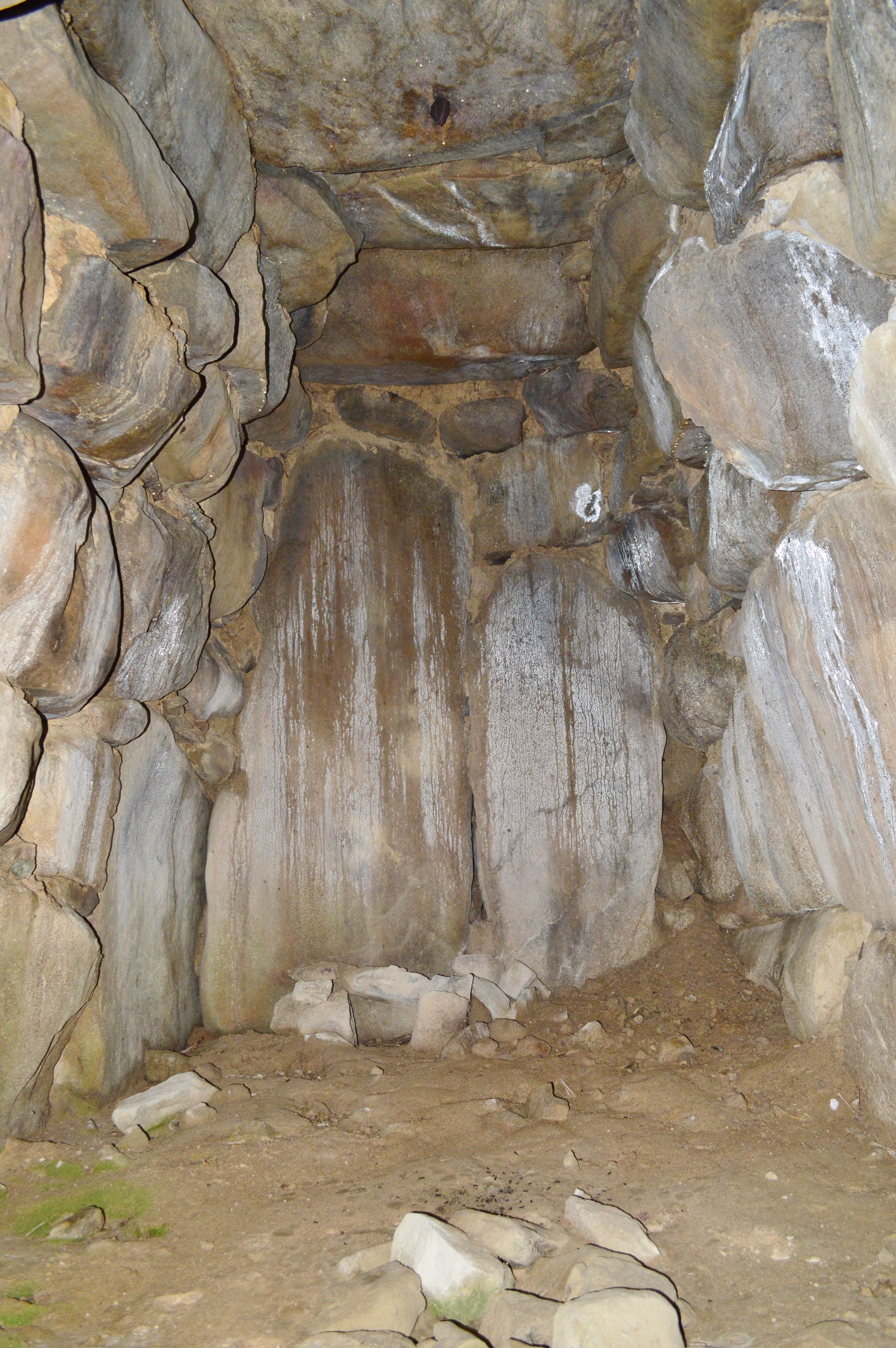 西山北古墳 石室玄室 Nikon D3200